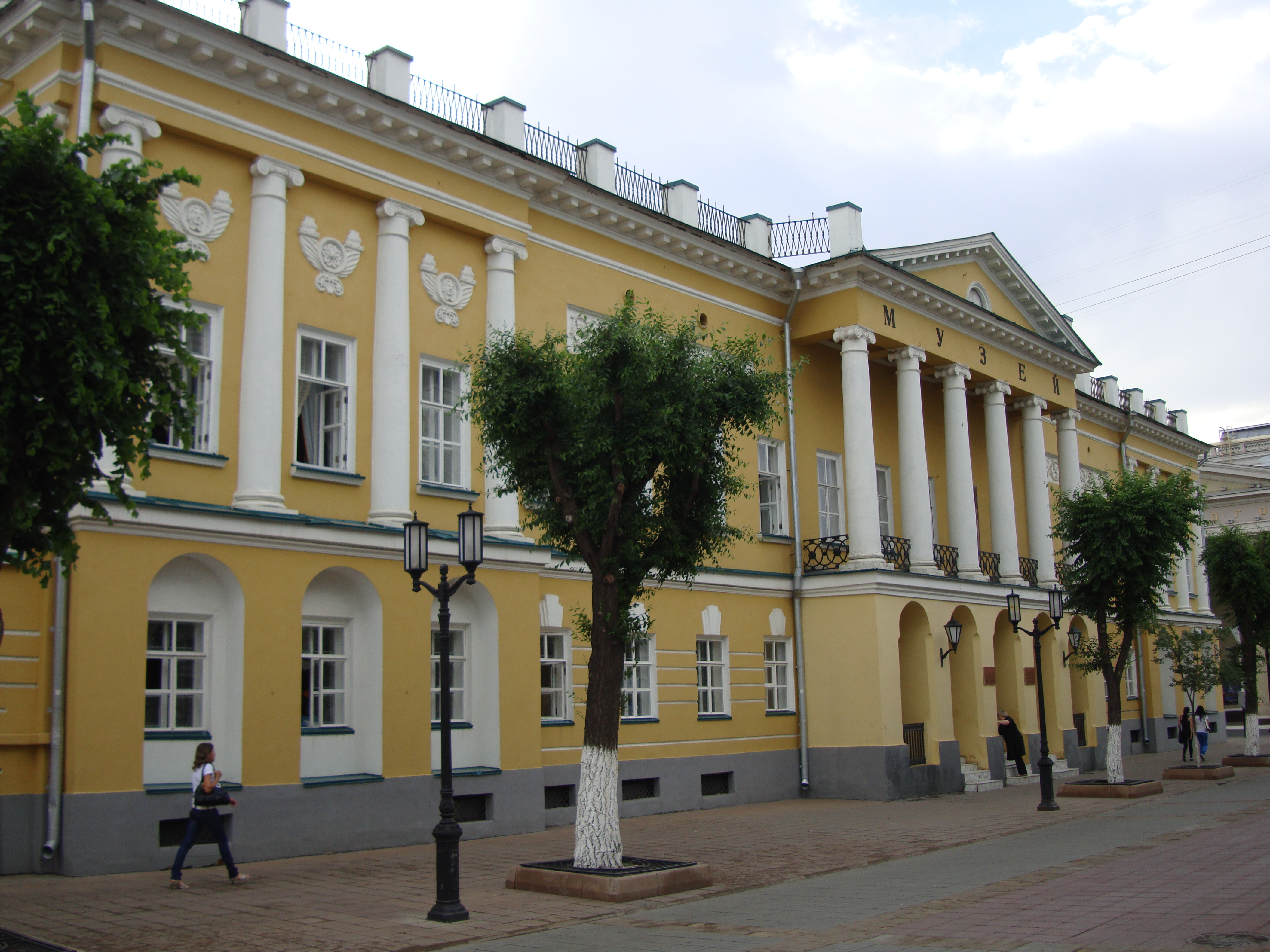 Оренбургский губернаторский историко-краеведческий музей (ул. Советская, д.28)